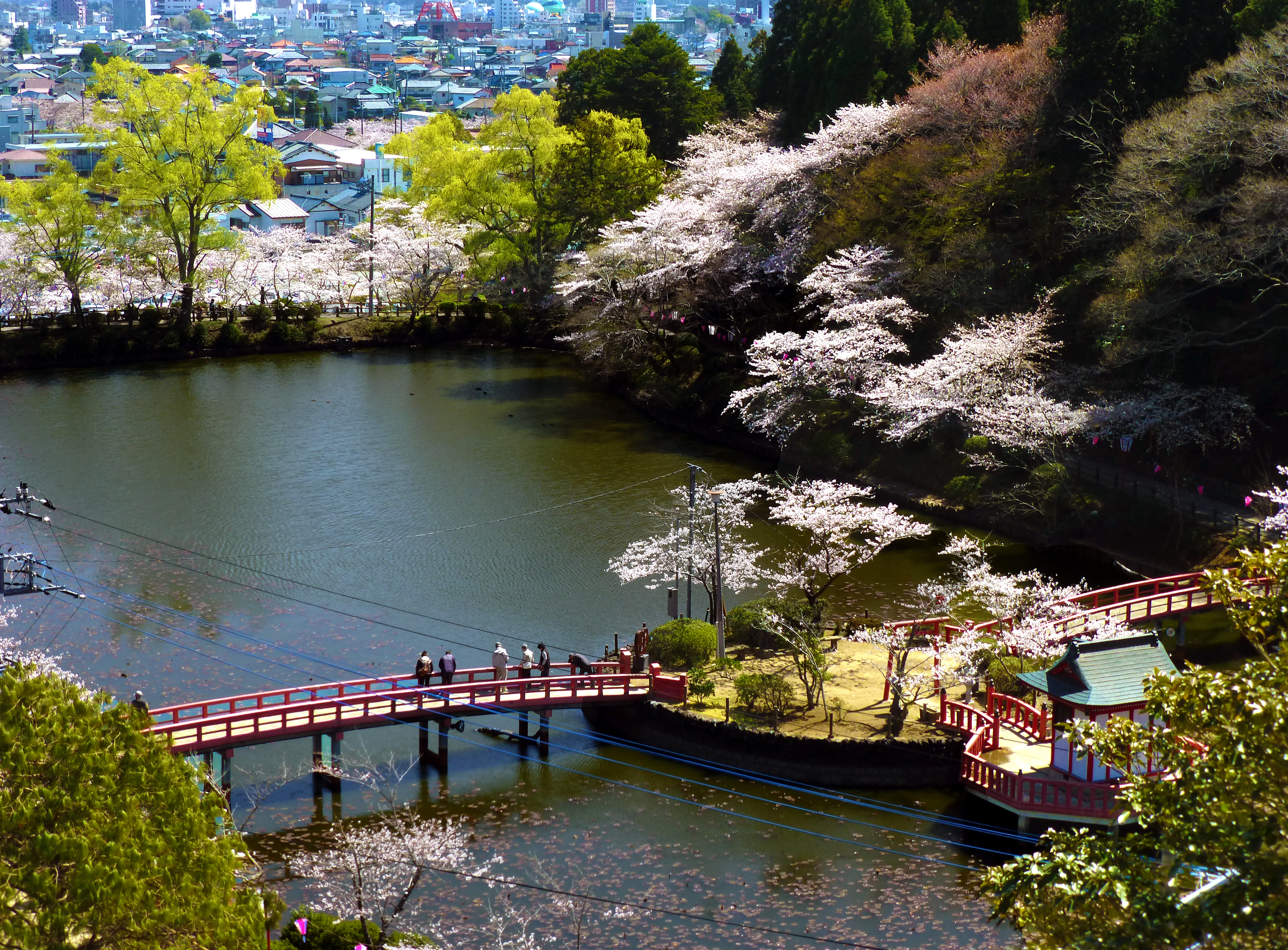 七夕祭りでも有名な千葉県茂原市の茂原公園の池を取り巻く桜並木です。